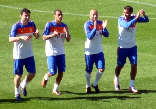 Mark van Bommel, Gregory van der Wiel, Demy de Zeeuw, Giovanni van Bronckhorst